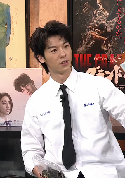 想見你劇組宣傳－許光漢